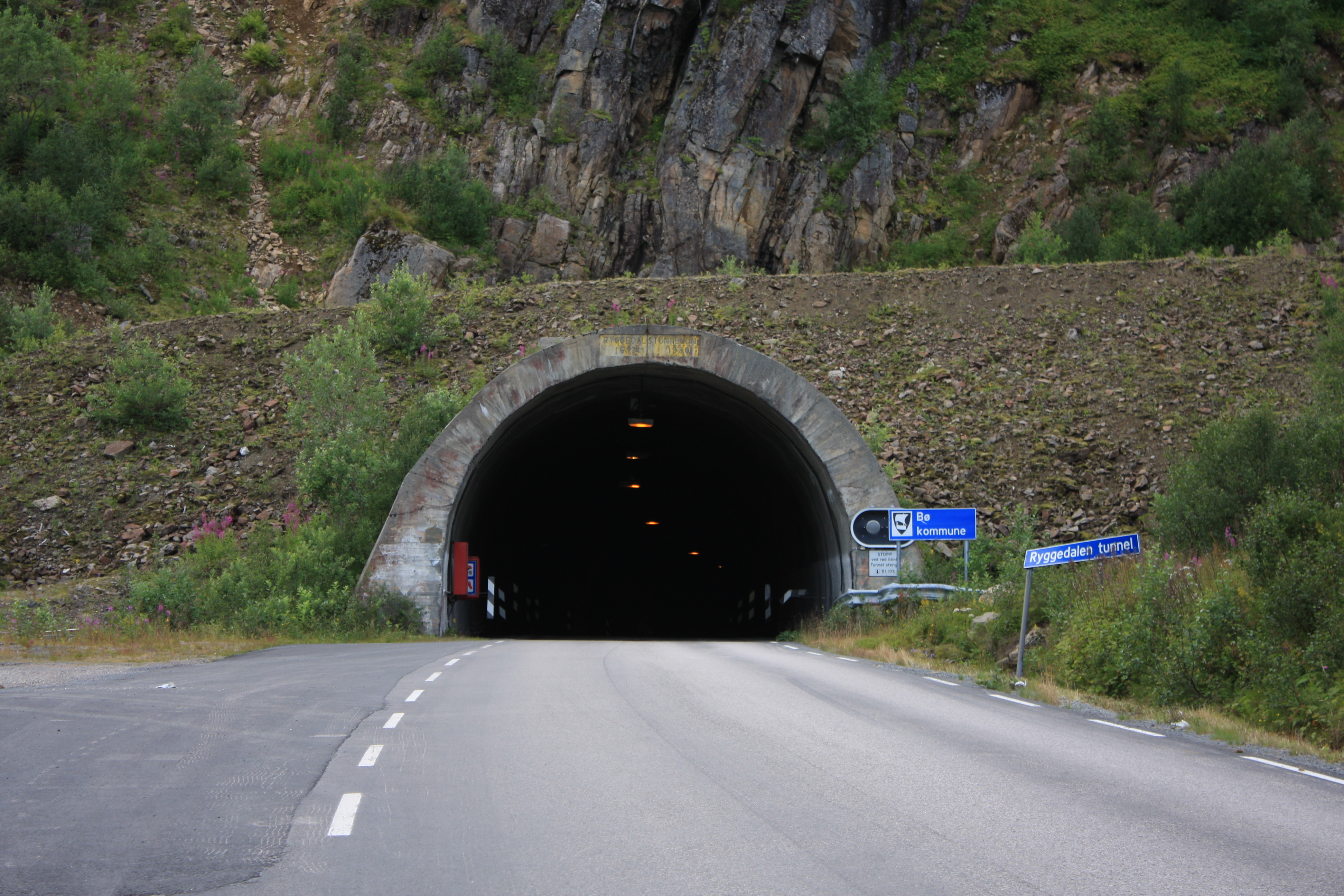 Sørøst-innslaget til tunnelen.